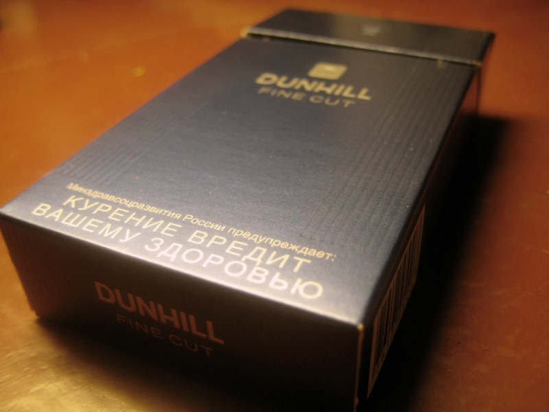 Фотография российской пачки сигарет Dunhill Fine Cut Dark Blue.